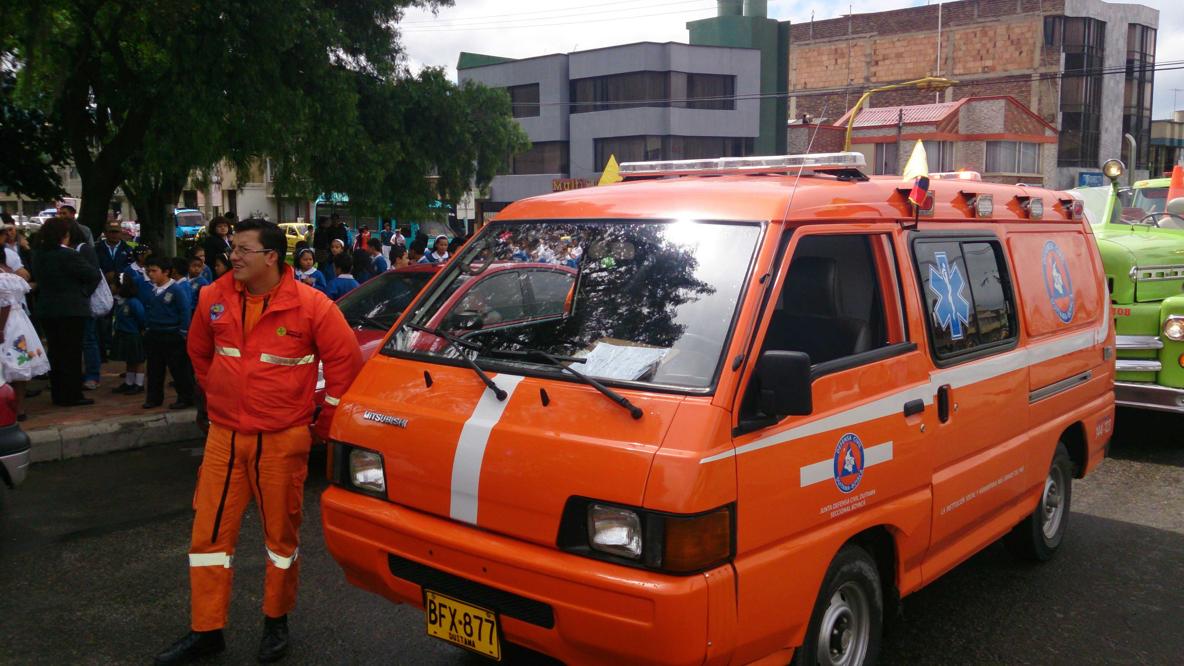 en desfile de independencia de Colombia